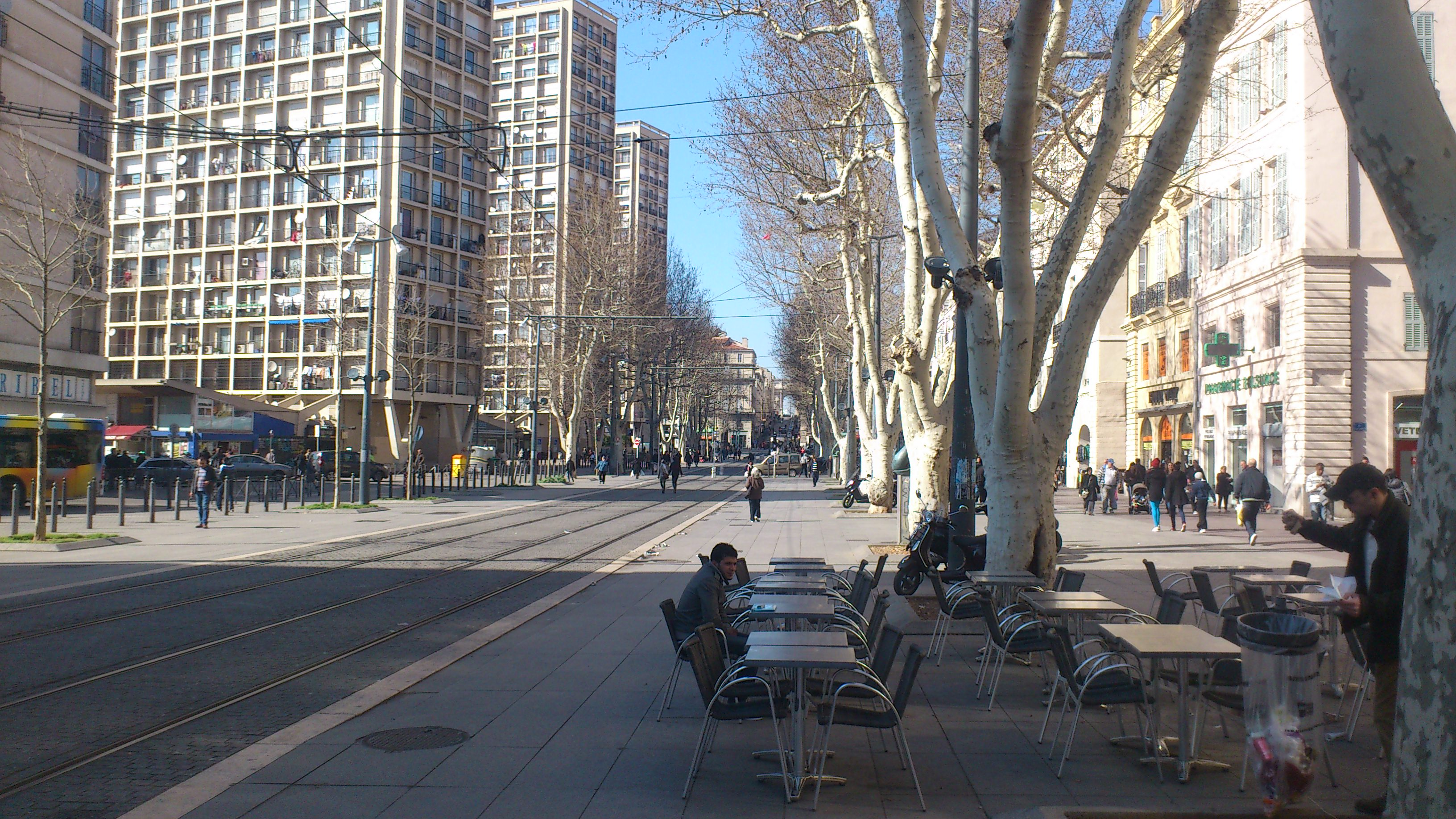 Cours Belsunce Marseille Provence Mars 2013